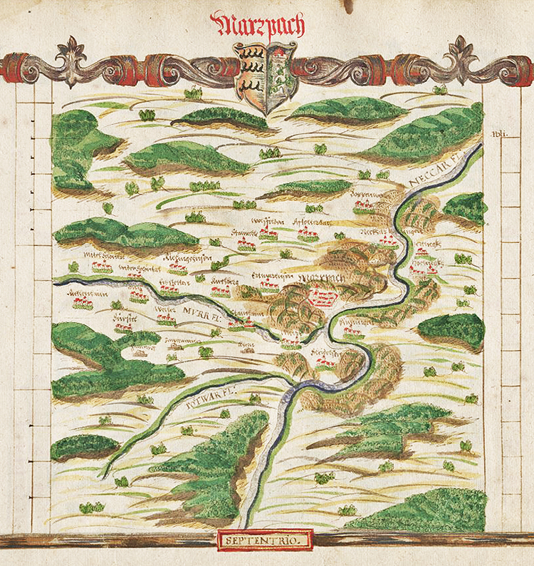 Amt Marbach im Atlas des Herzogtums Württemberg (1575), fol. X - Cod.hist.qt.102; Blatt 35, von Heinrich Schweickher (Ausschnitt)